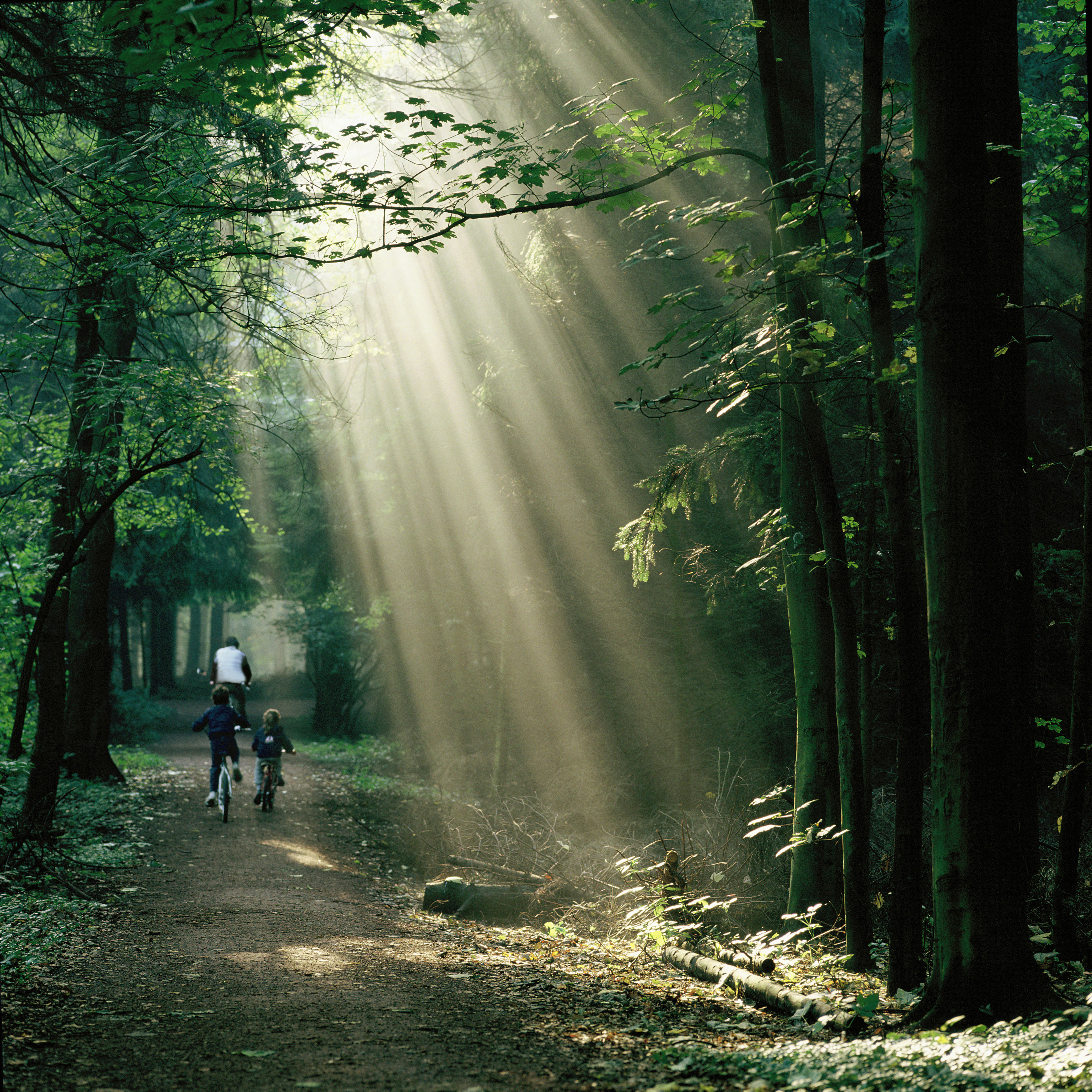 Sonnenstrahlen durchbrechen den dichten Waldhimmel im "Renaissance-Tiergarten Wasserschloss Raesfeld", im "Naturpark Hohe Mark".